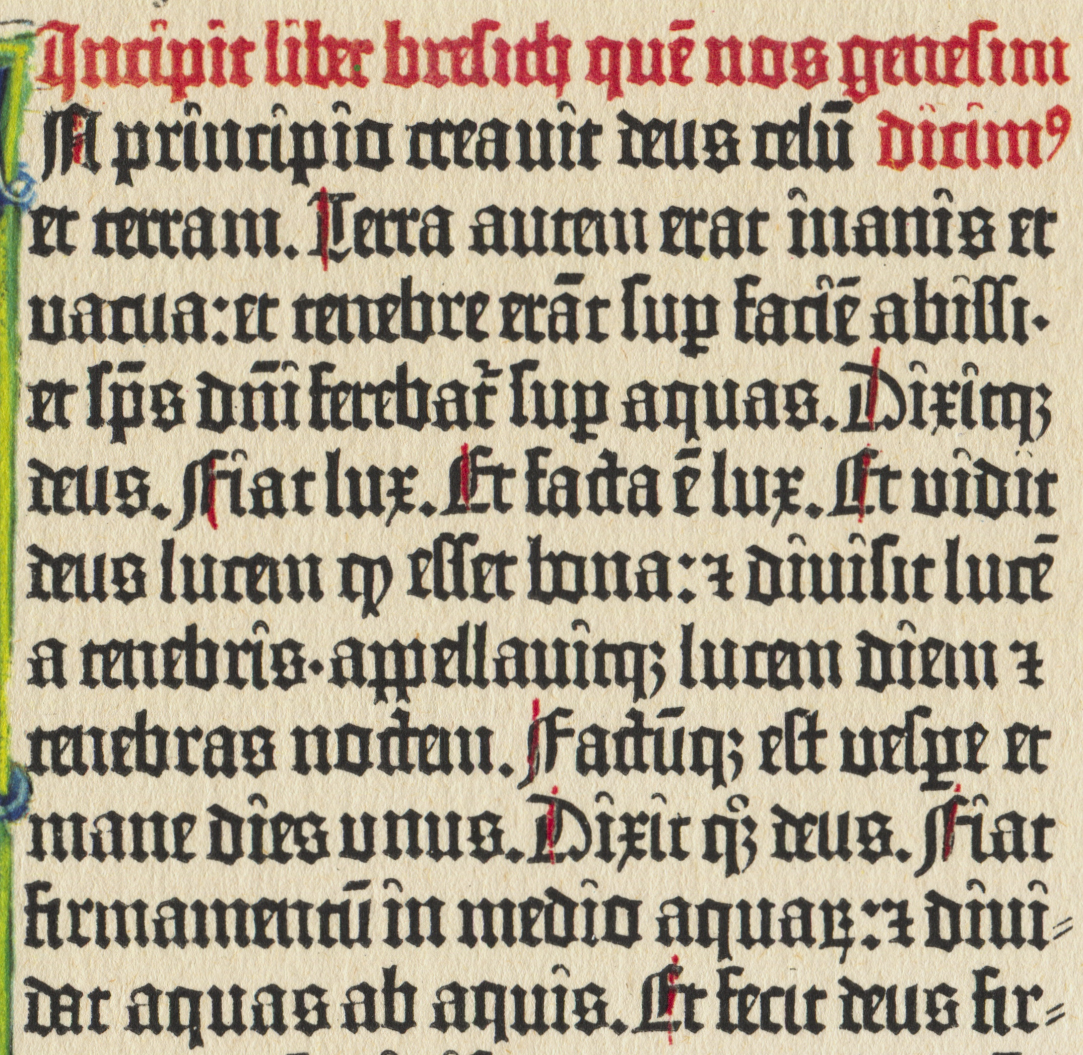 Textbeispiel aus der 42-zeiligen Gutenberg-Bibel